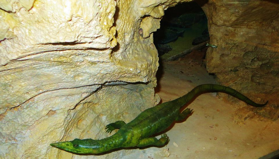 Endennasaurus reconstruction